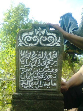 Salah satu batu nisan di situs Kerajaan Lamuri